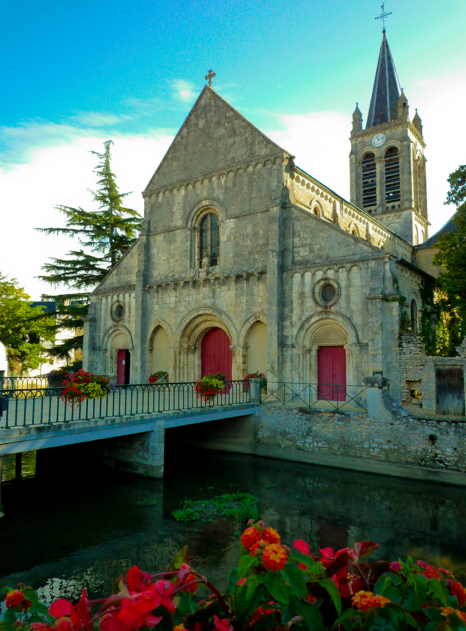 Église Notre-Dame à Lignières dans le département du Cher .